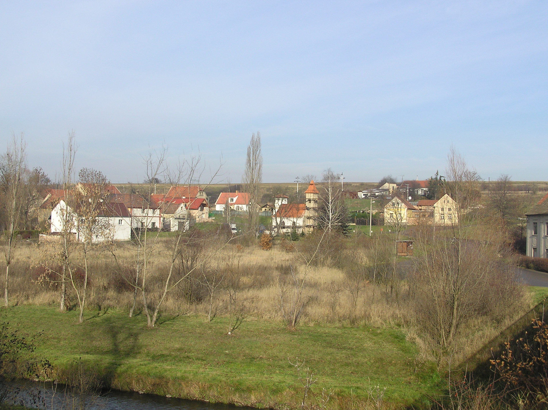 Zálezly od Chomutovky